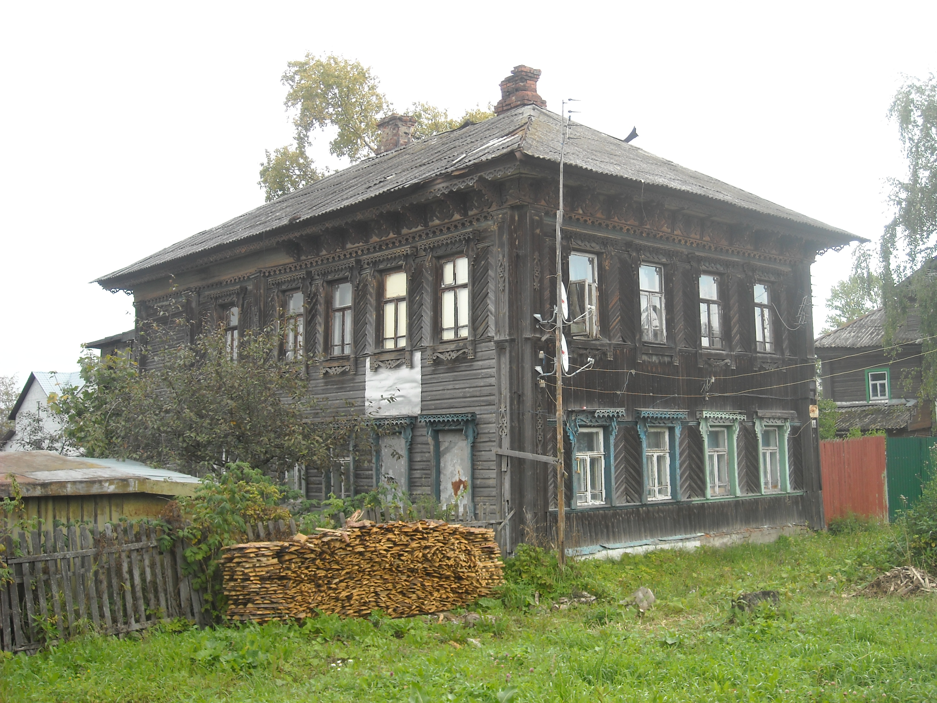 Дом жилой: улица Шитова, 44, Тутаев, Ярославская область